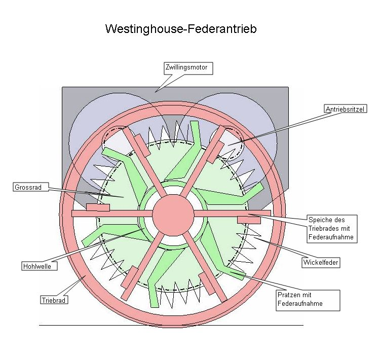 Westinghouse-Federantrieb